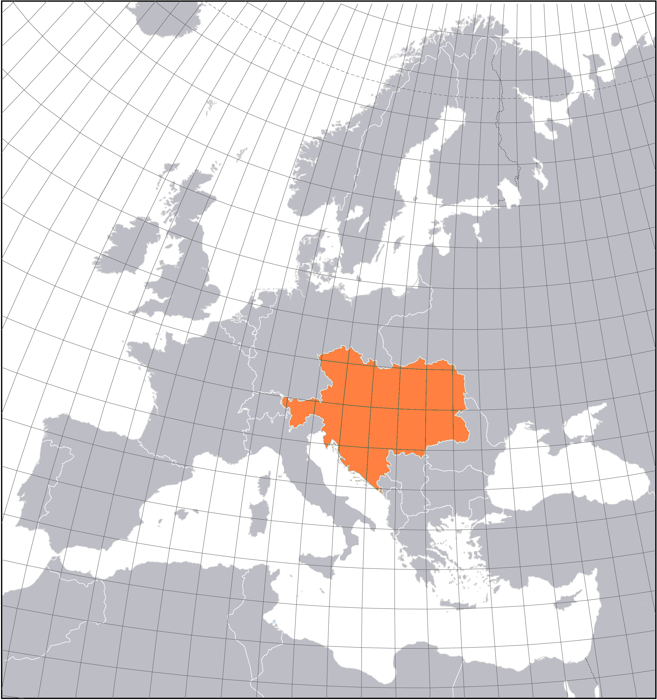 Karte Europas im Jahre 1914 am Vorabend des 1. Weltkrieges. Österreich-Ungarn ist hervorgehoben